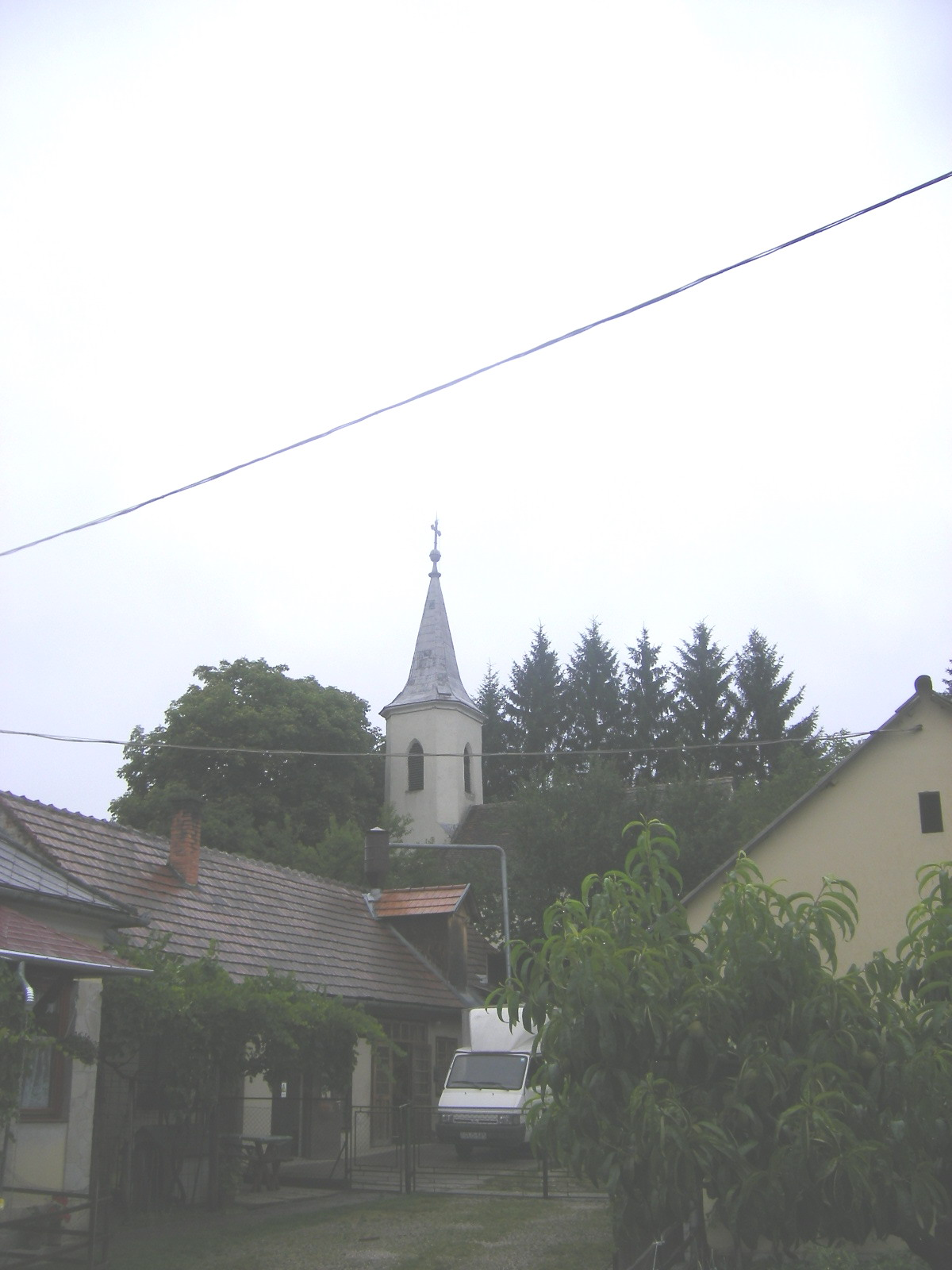 Nagyrákos, Borromei Szent Károly római katolikus templom